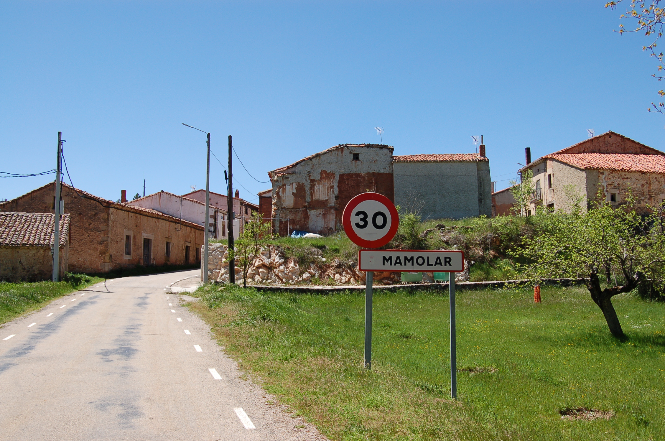 Acceso a Mamolar desde el este